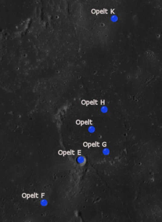 Cráter lunar Opelt. Cráteres satélite. (Imagen LRO)